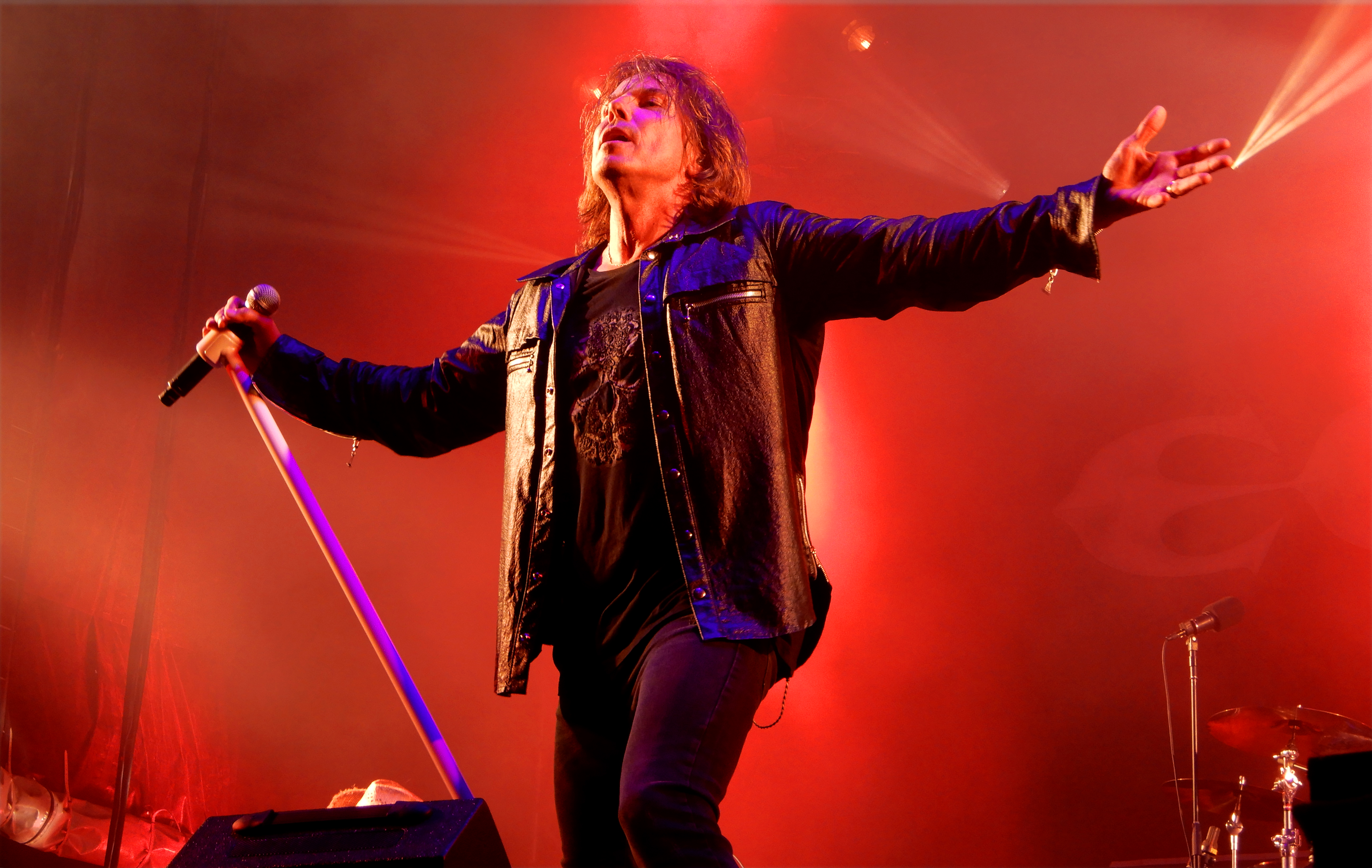 JoeyTempest au Festival Estival de Trélazé en 2019